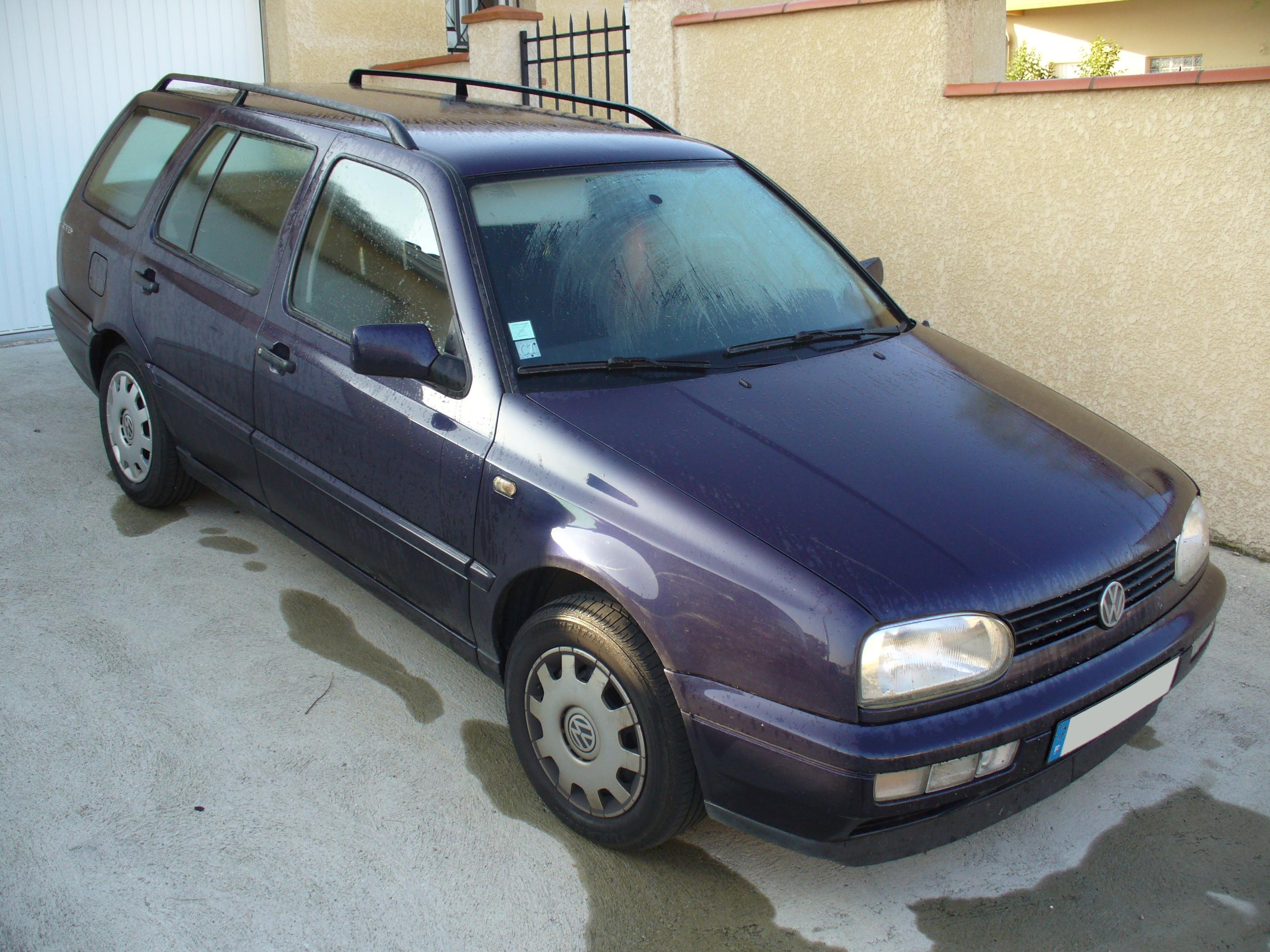 VW Golf III Variant Joker